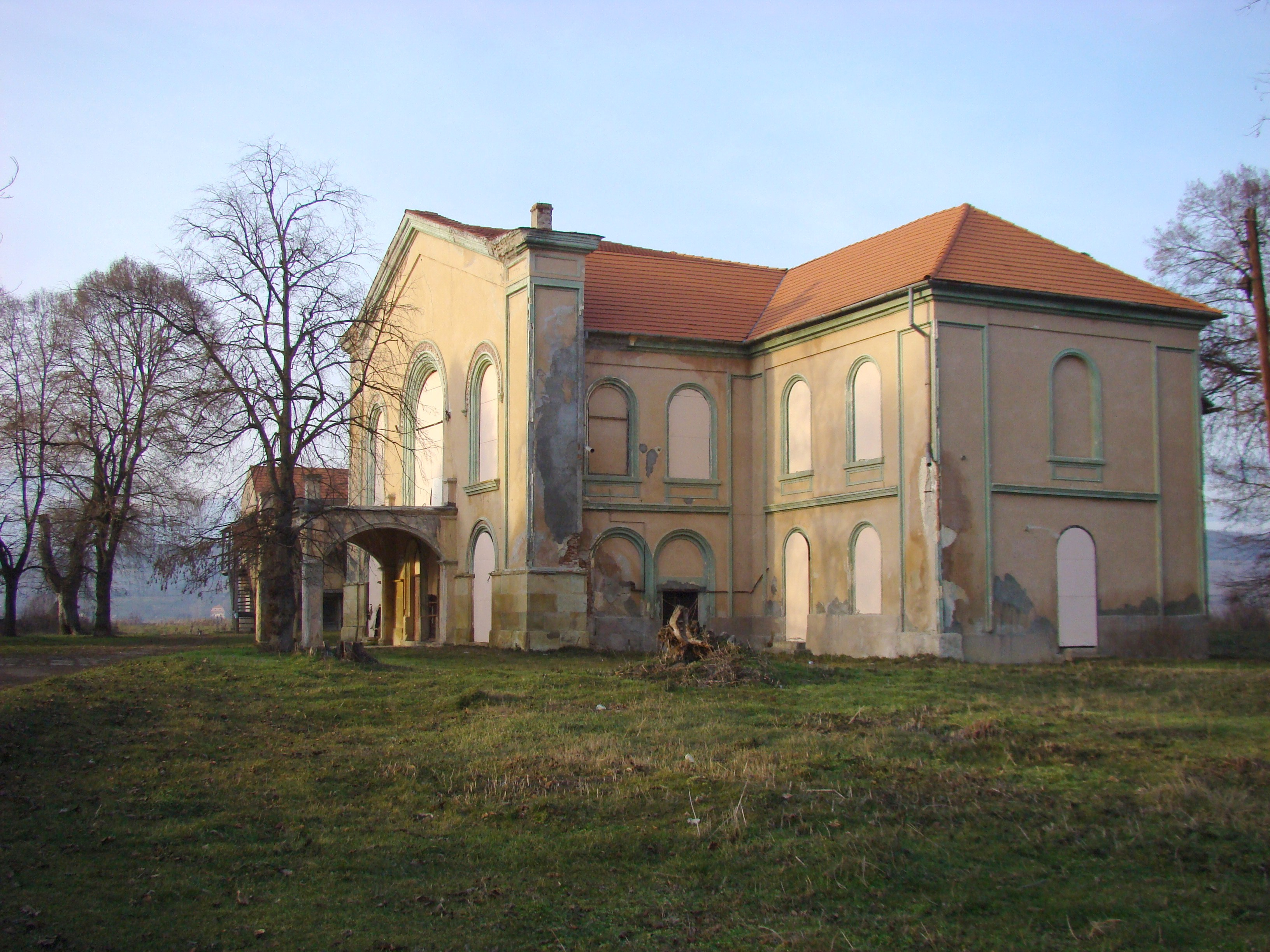 Castelul Bethlen, sat Bahnea; comuna Bahnea, Str. Republicii 55